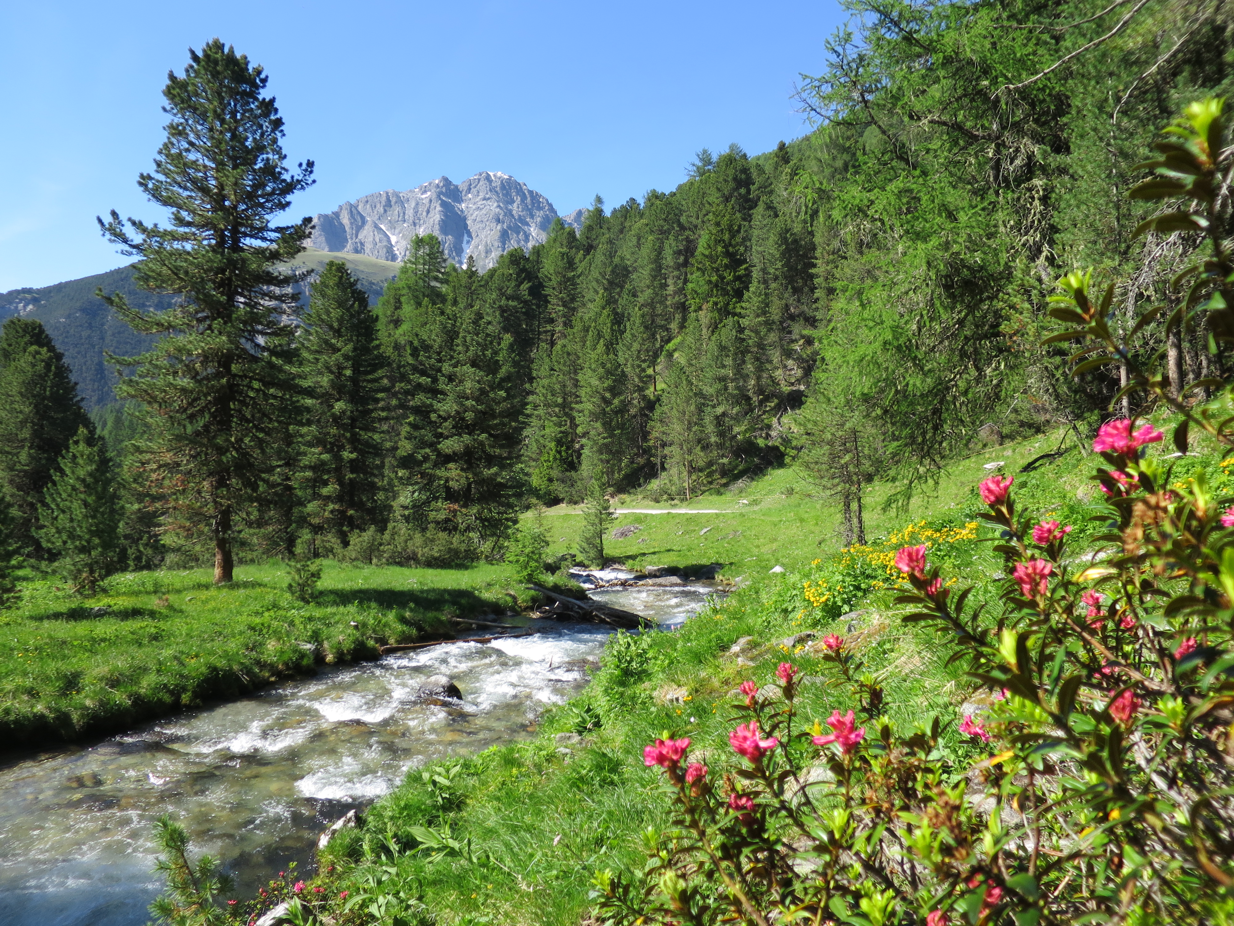 Val S-charl mit Piz Madlain, Schweiz